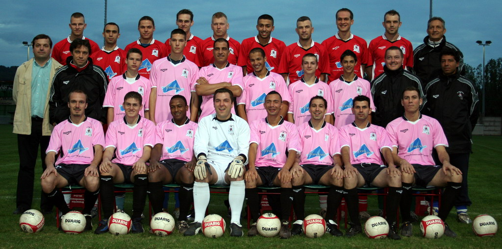 Equipe du SO-Merlebach Photo du 5 octobre 2006